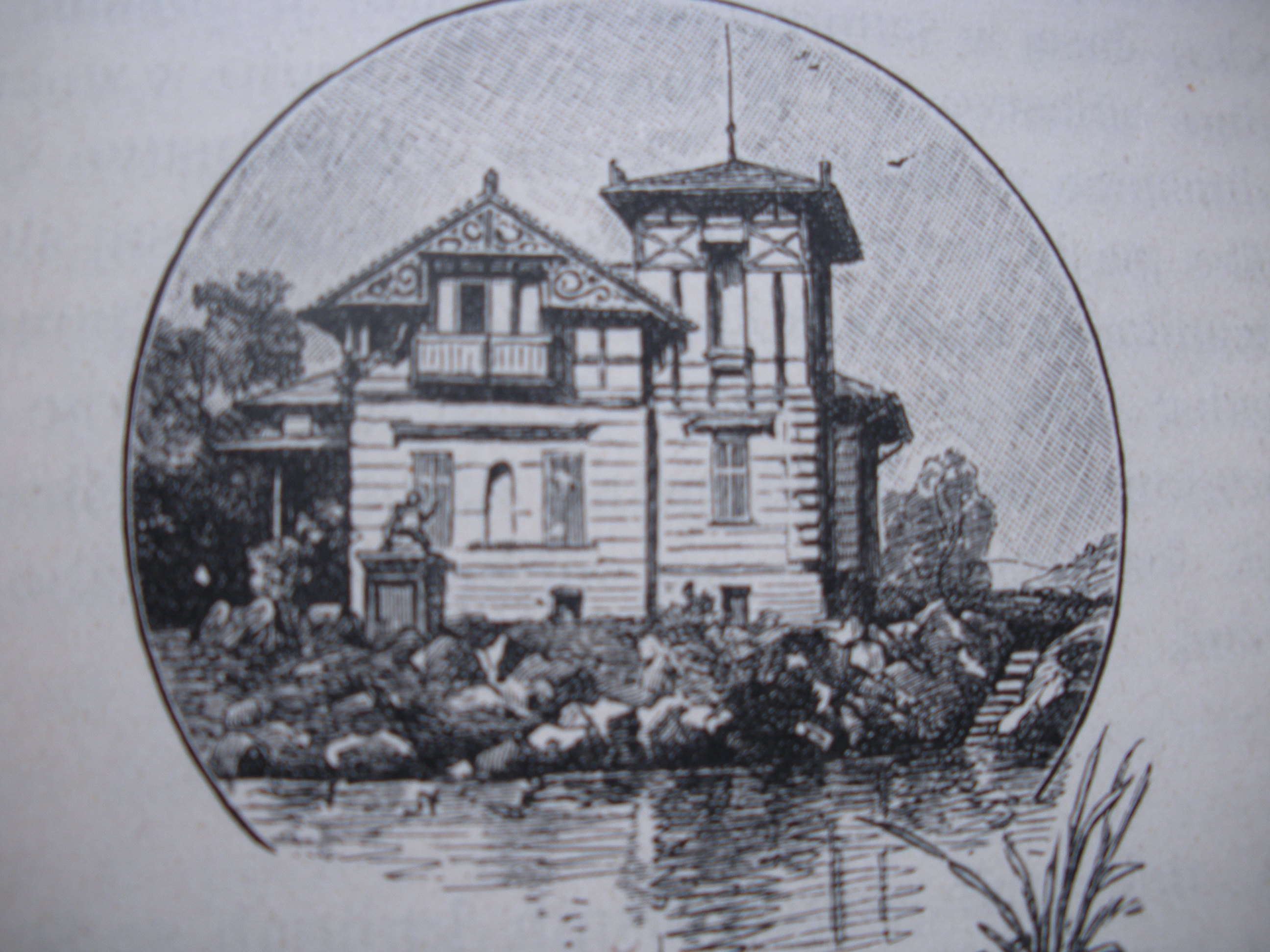 Preslikava iz knjige: Ljudevit Stiasny, Kamnik. Zemljepisno-zgodovinski opis; izdal in založil, Ljudevit Stiasny, Ljubljana, 1894.